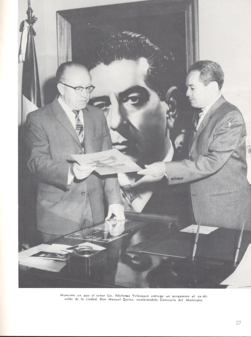 Fotografía tomada por José Saldaña Rico a la página 27 del Primer Informe de Gobierno del Lic. Ildefonso Velásquez Martínez, Presidente Municipal del IV Ayuntamiento de Tijuana, B.C., rendido el 1o. de diciembre de 1963. En la fotografía aparece con Manuel Quirós, Presidente Municipal del II Ayuntamiento de Tijuana y miembro de la Logia Masónica Ignacio Zaragoza No. 3 de Tijuana, B.C. El texto a pie de foto dice: "Momento en que el señor Lic. Ildefonso Velásquez entrega un pergamino al ex-alcalde de la ciudad, Don Manuel Quirós, nombrándolo Consejero del Municipio".